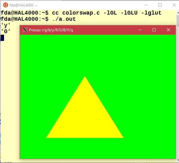 OpenGL sous W10 : le programme interactif colorswap.c illustrant l'article OpenGL s'exécute sans problème sous WSL sous un serveur X comme Xming